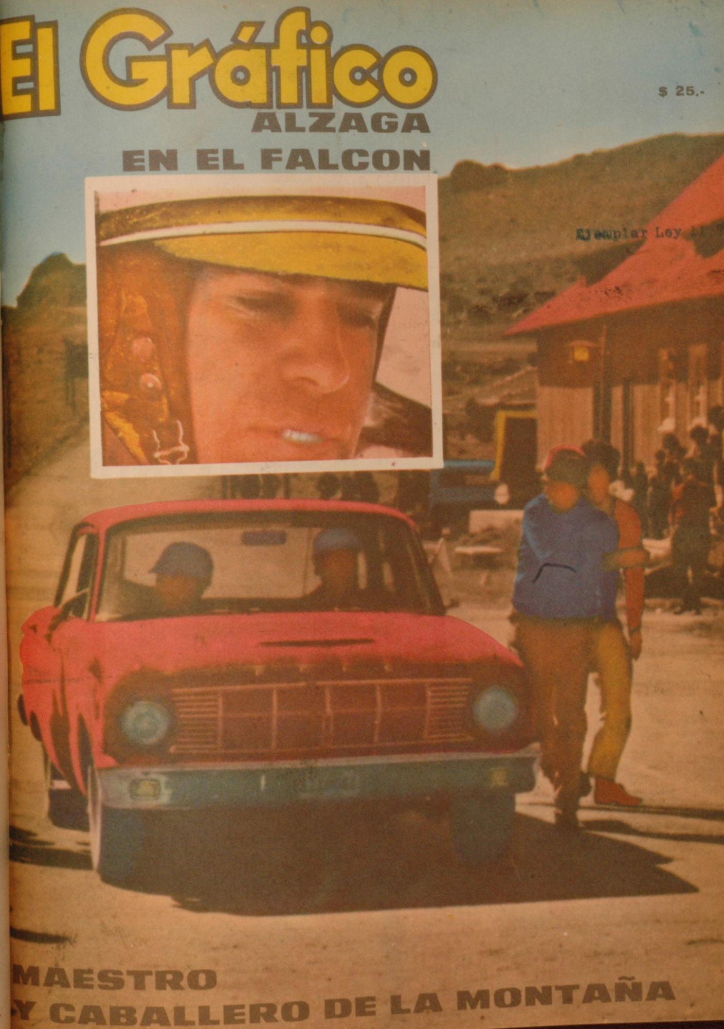 El Grafico del 24 de Marzo de 1965. Edicion 2372